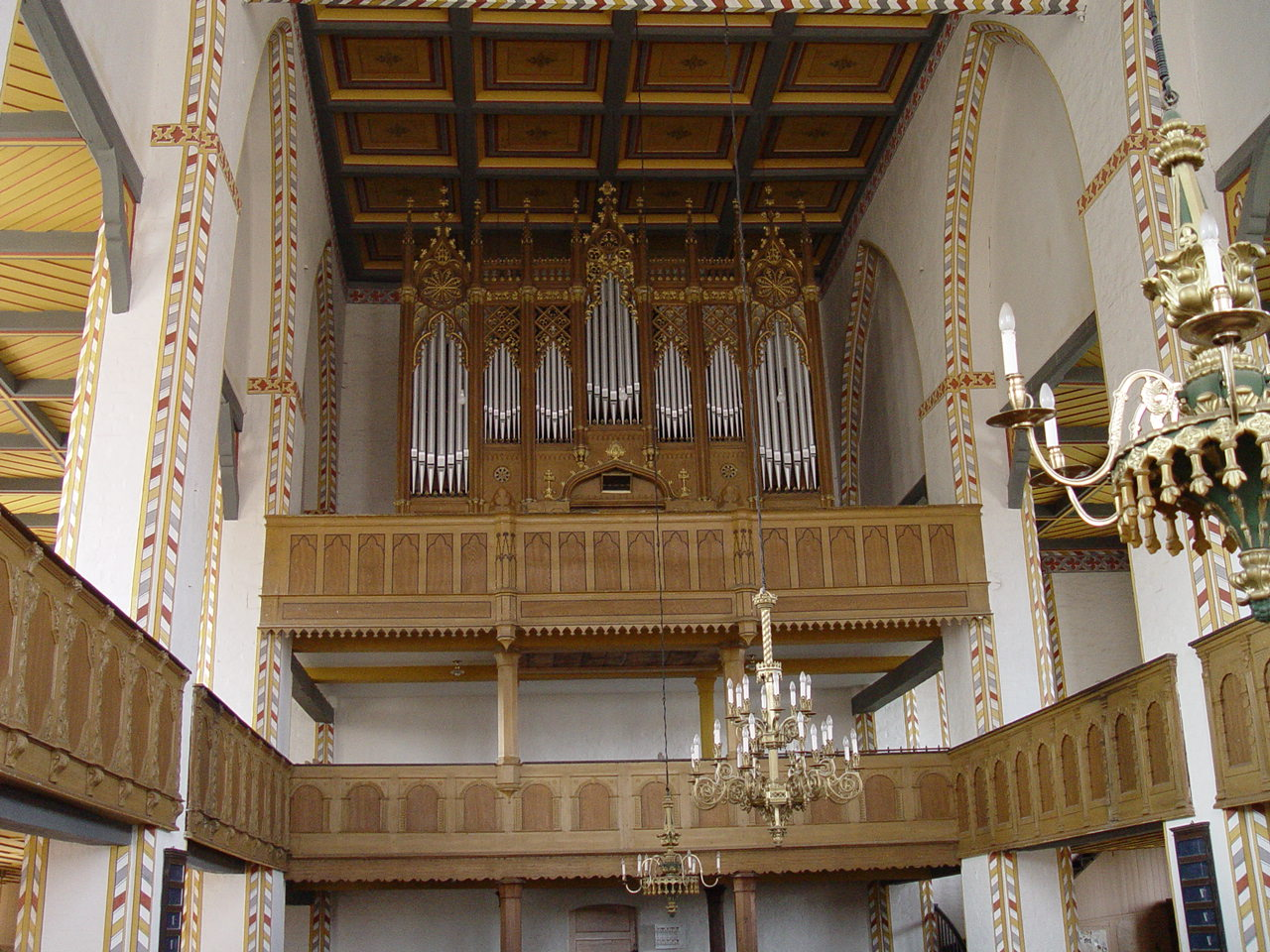 Winzer Orgel in Schönberg/Mecklenburg-Vorpommern